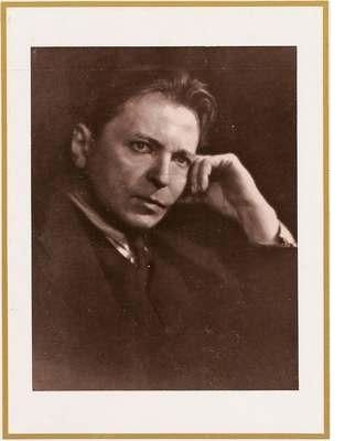 Since this photograph was first published in 1931 in Romania and its photographer is unknown, according to the World International Property Organisation Copyright Treaty adopted in Geneva, 1996 [1] and to the Romanian Law on copyright, the protection expired on 1st January 2002. Source Catalogue du Festival International Georges Enesco, Ministère de la Culture et des Cultes, Bucarest, 2007